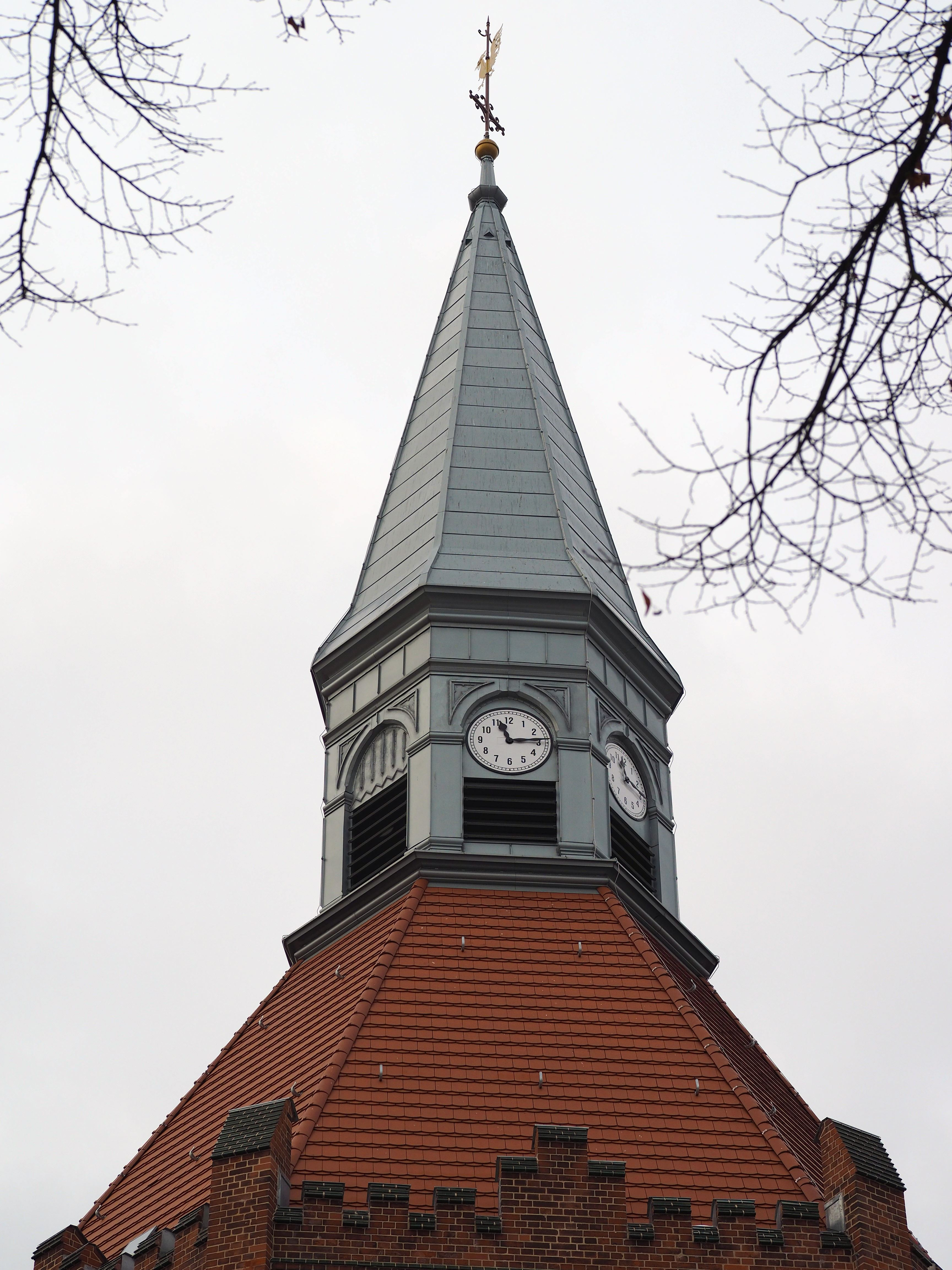 Siebeneckiger Kirchturm der Kirche Vom Guten Hirten in Berlin-Marienfelde mit Wetterhahn, Kreuz, Turmuhren, Schallablenkplatten für das Geläut, Biberschwanz-Kronendeckung und Backsteinzinnen